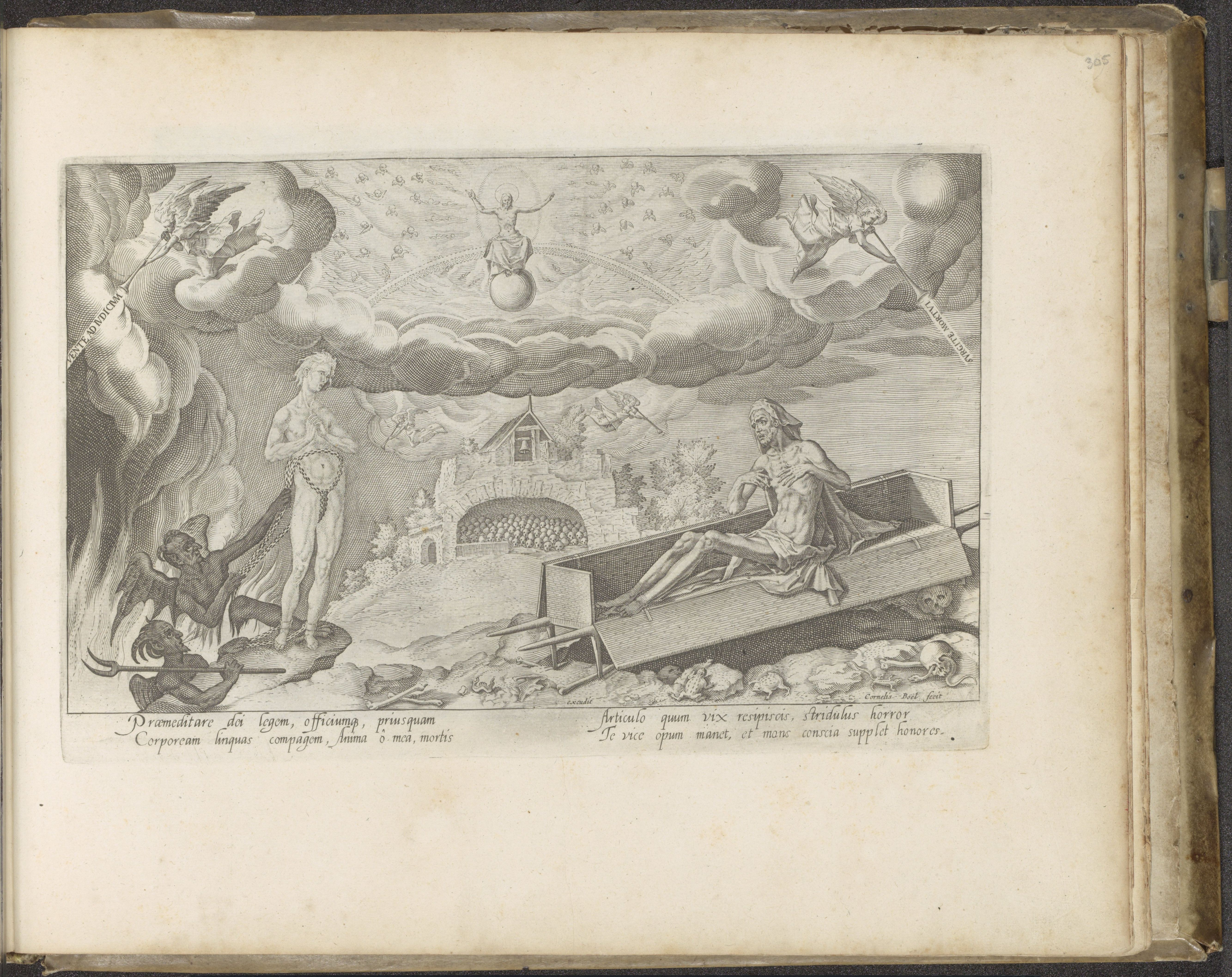 Christ est assis comme un juge sur l'arc en ciel, ses pieds reposant sur le globe. Fait partie d'un album.